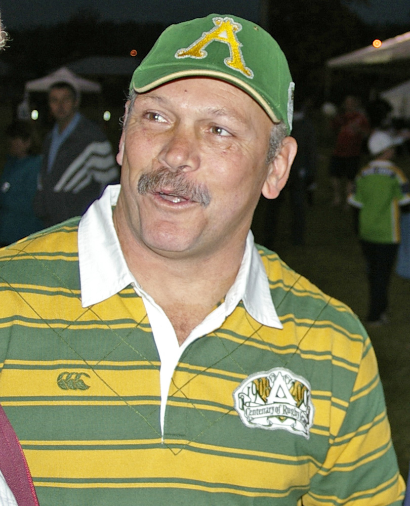 Cliff Lyons